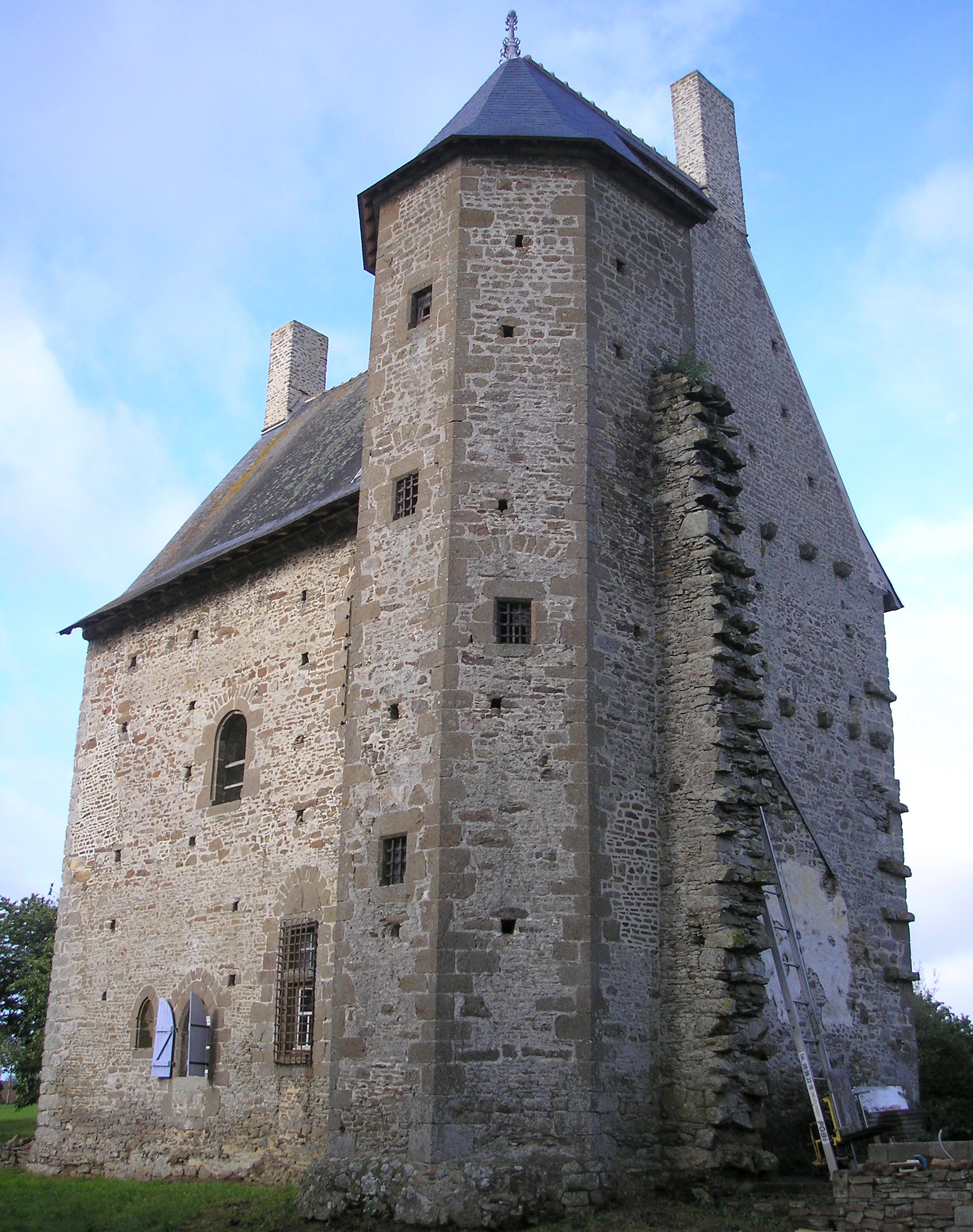 Sept-Forges (Normandie, France). Le manoir de Mebzon.